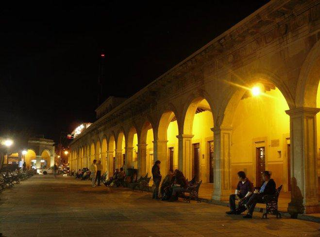 El centro plaza de Uriangato, Guanajuato